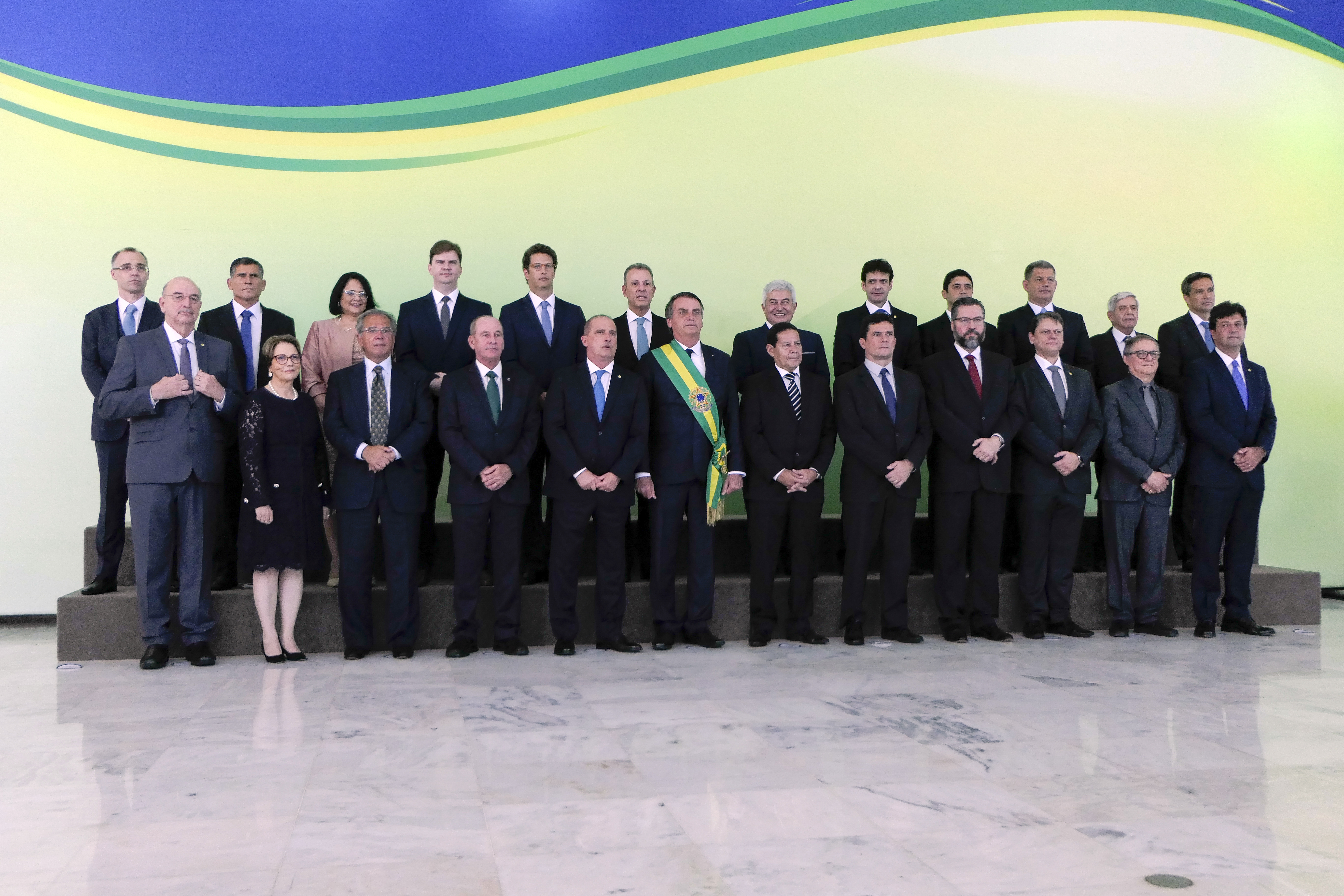 O presidente Jair Bolsonaro dá posse à equipe ministerial no Palácio do Planalto. Participam: presidente da República, Jair Bolsonaro; ministro da Casa Civil, Onyx Lorenzoni; ministro da Defesa, general Fernando Azevedo; ministro das Relações Exteriores, Ernesto Araújo; ministro da Economia, Paulo Guedes; ministro de Infraestrutura, Tarcísio Freitas; ministra da Agricultura, Pecuária e Abastecimento, Teresa Cristina; ministro da Educação, Ricardo Rodrigues; ministro da Cidadania, Osmar Terra; ministro da Saúde, Luiz Henrique Mandetta; ministro de Minas e Energia, Almirante Bento Costa Lima; ministro da Ciência, Tecnologia, Inovações e Telecomunicações, Marcos Pontes; ministro do Meio Ambiente, Ricardo Salles; ministro do Turismo, Marcelo Antonio; ministro do Desenvolvimento Regional, Gustavo Canuto; ministra dos Direitos Humanos, Damaris Alves; ministro da Secretaria-Geral da Presidência, Gustavo Bebianno; ministro da Transparência, Wagner Rosário; ministro da Justiça, Sergio Moro; ministro da Secretaria de Governo da Presidência da República, general Carlos Alberto Cruz; ministro de Segurança Institucional, General Augusto Heleno; ministro da Advocacia-Geral da União, André Luiz Mendonça; presidente do Banco Central, Roberto Campos Neto. Foto: Roque de Sá/Agência Senado